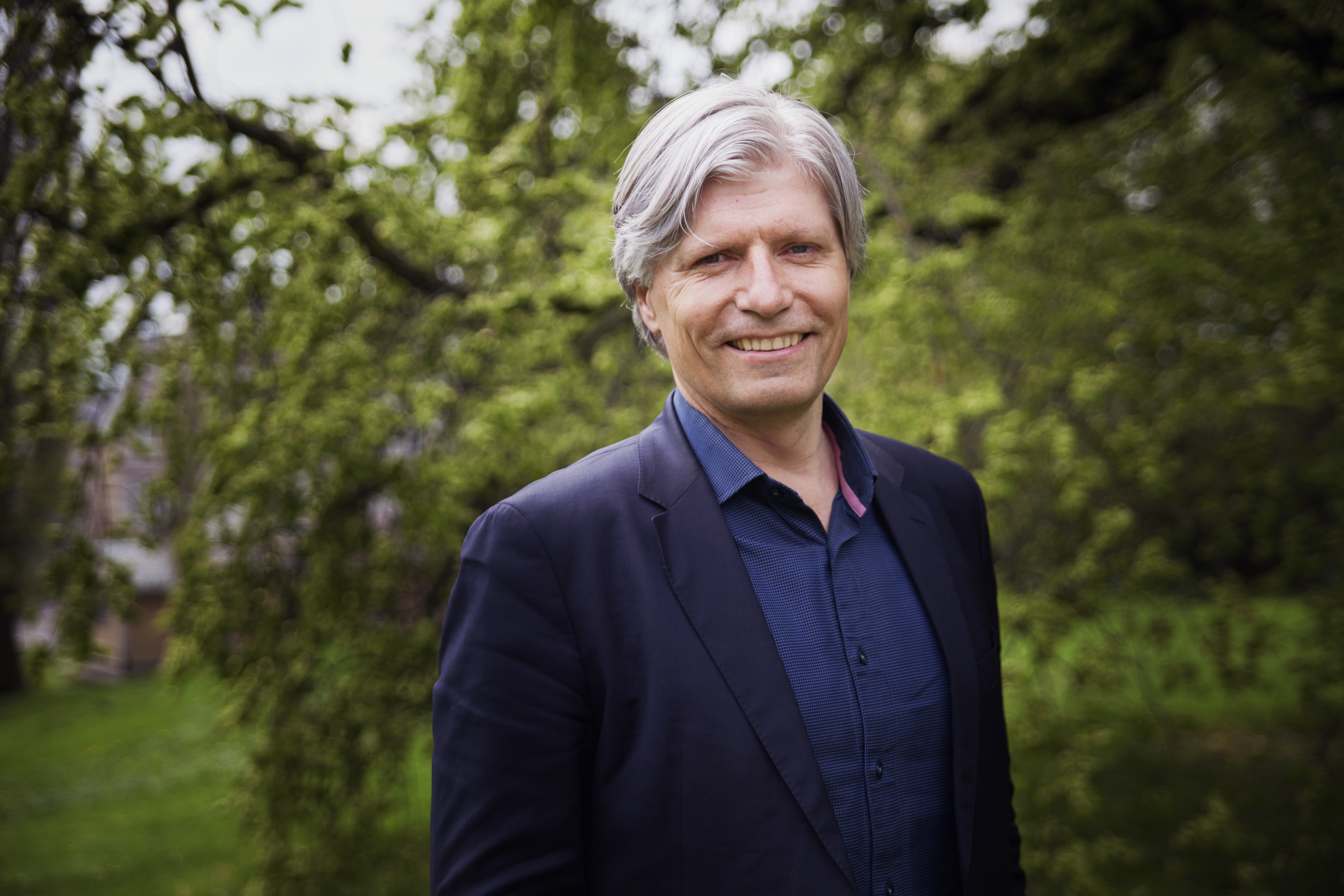 Klima- og miljøminister Ola Elvestuen (Venstre)